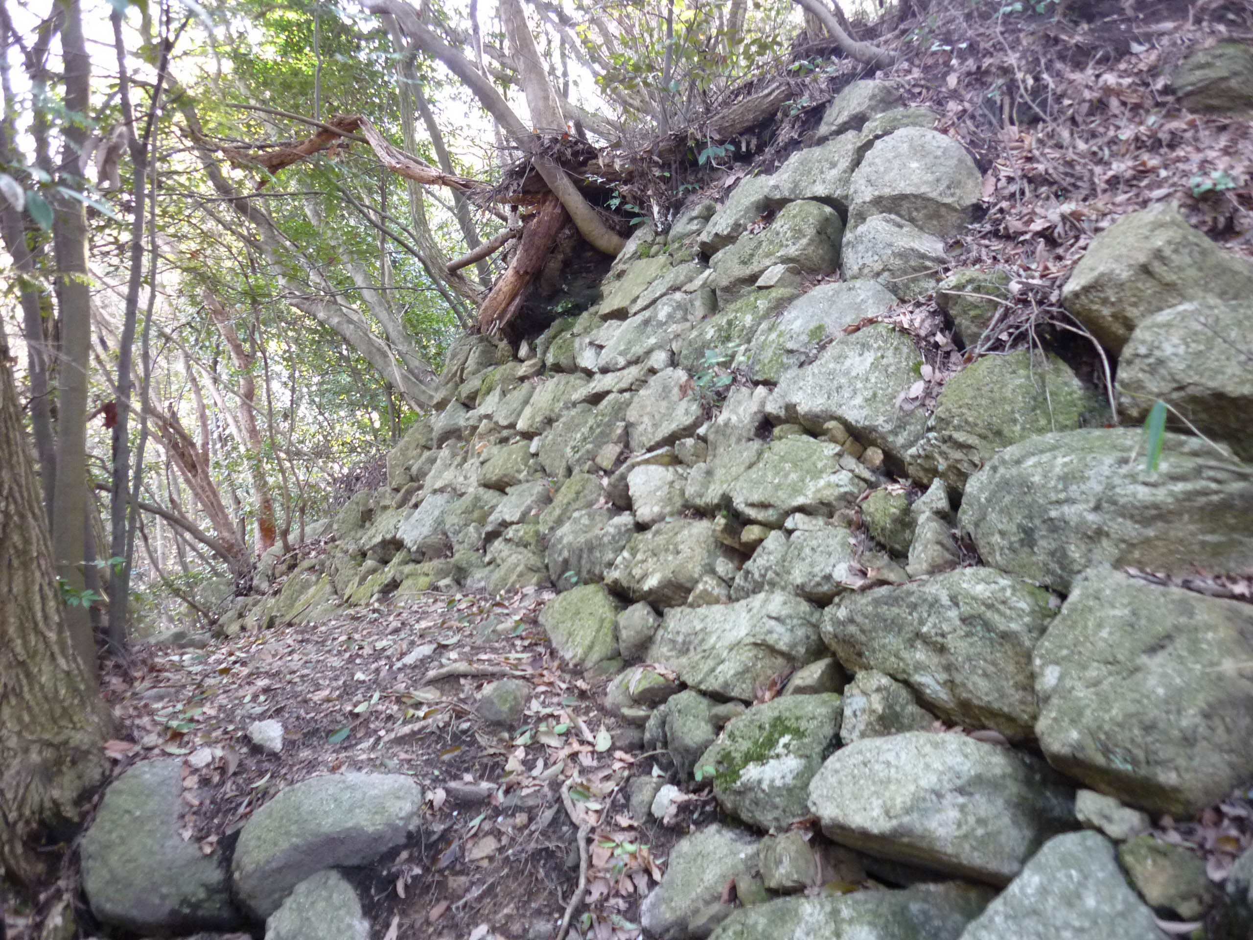 石垣